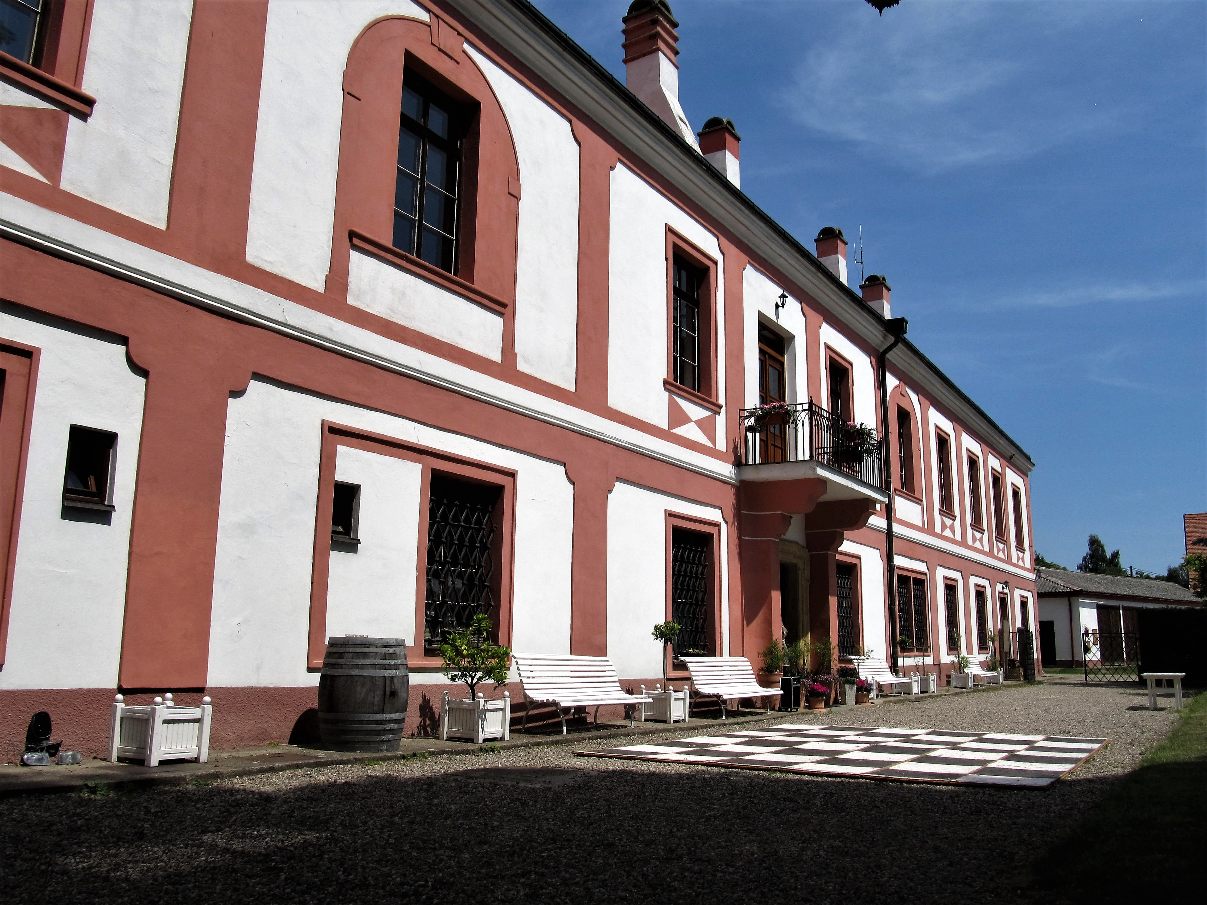 Zahradní průčelí zámku